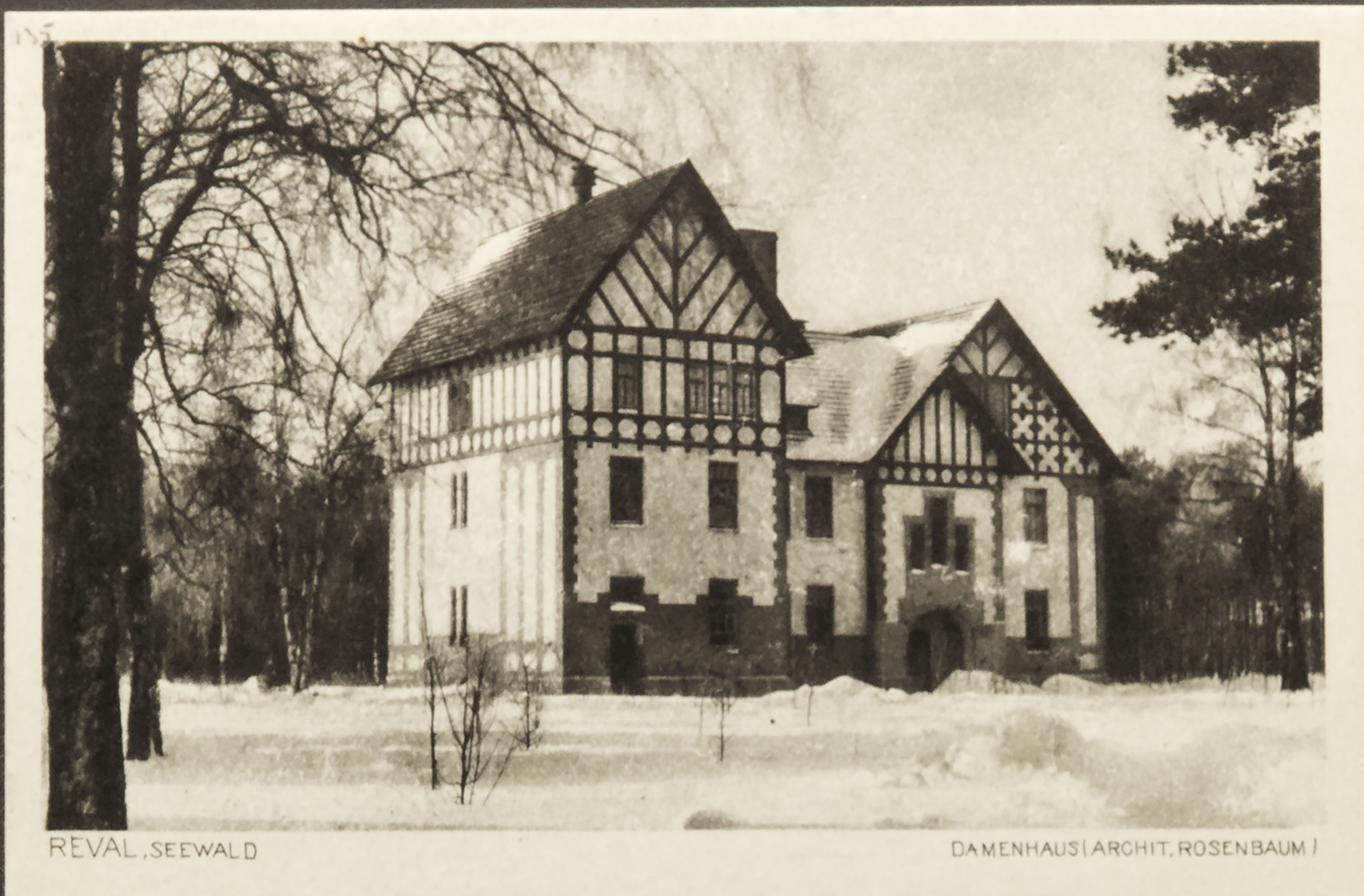 Seewald. Damenhaus arhitekt Jacques Rosenbaum